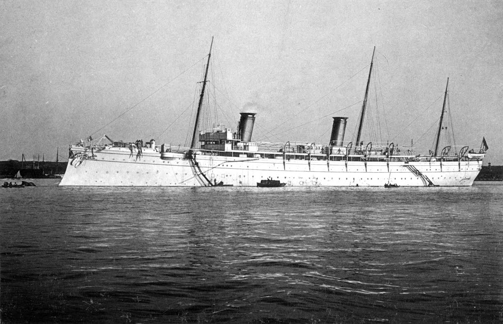 Kaiseryacht HOHENZOLLERN